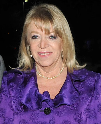 26-07-11 Aniversario La Segunda